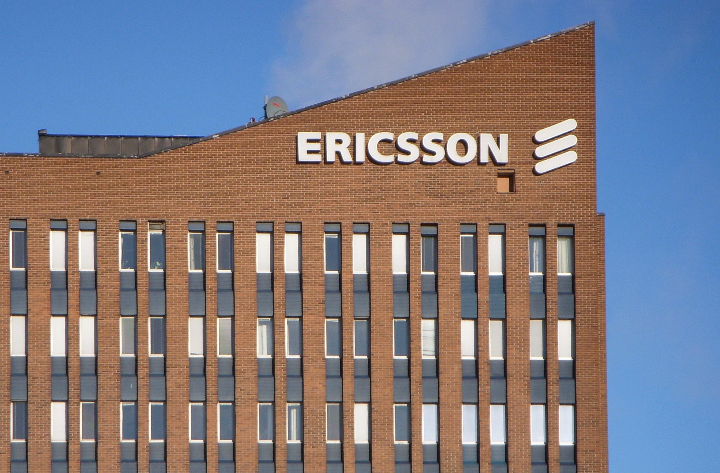 LM Ericssons kontorsbyggnad vid Södertäljevägen, Stockholm